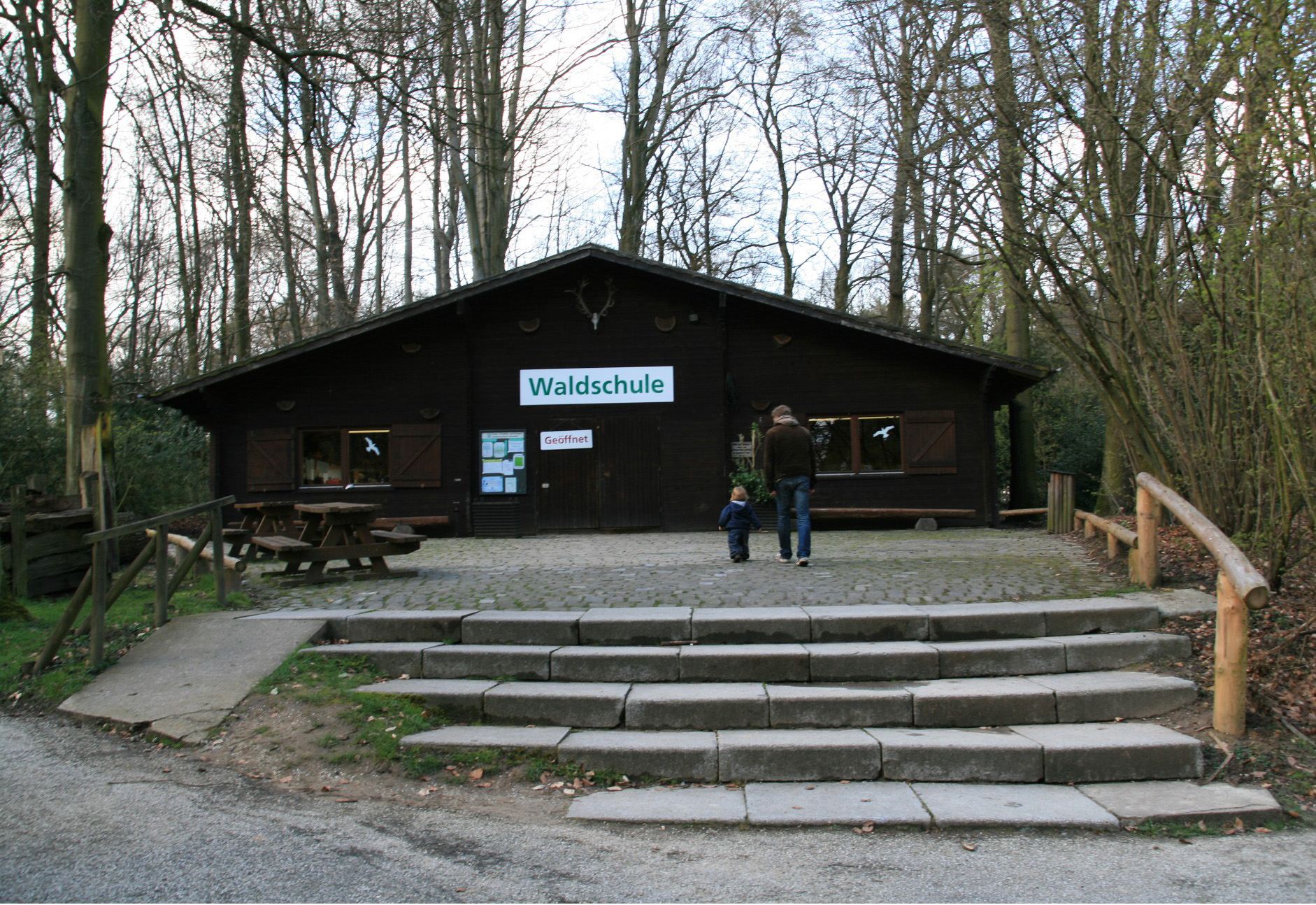 Wildpark im Grafenberger Wald in Düsseldorf. Frontansicht der Waldschule.